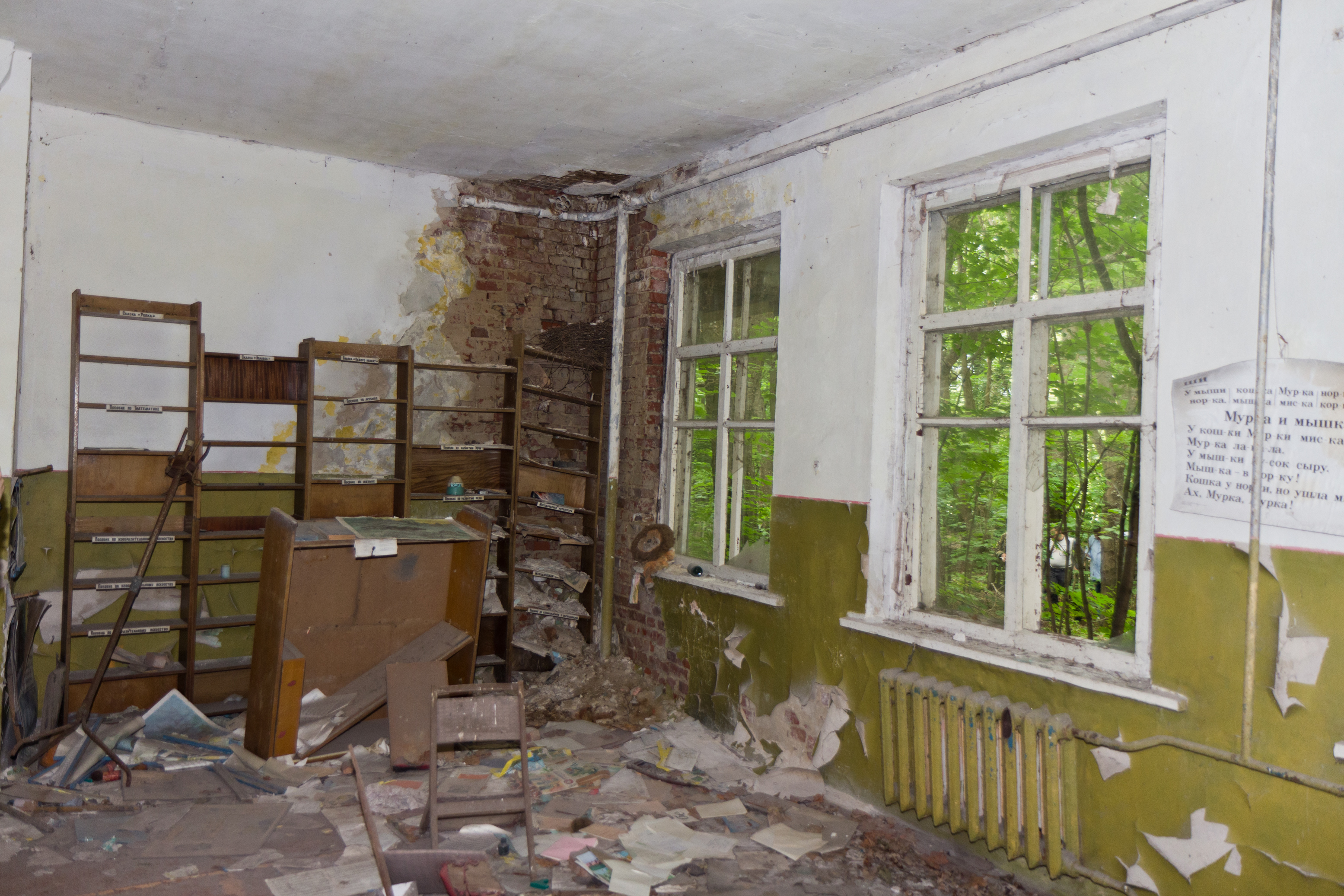 Kopatschi - Wegen der Nuklearkatastrophe von Tschernobyl 1986 verlassenes Dorf innerhalb der "Verbotenen Zone" um das ehemalige Kernkraftwerk Tschernobyl in der Ukraine